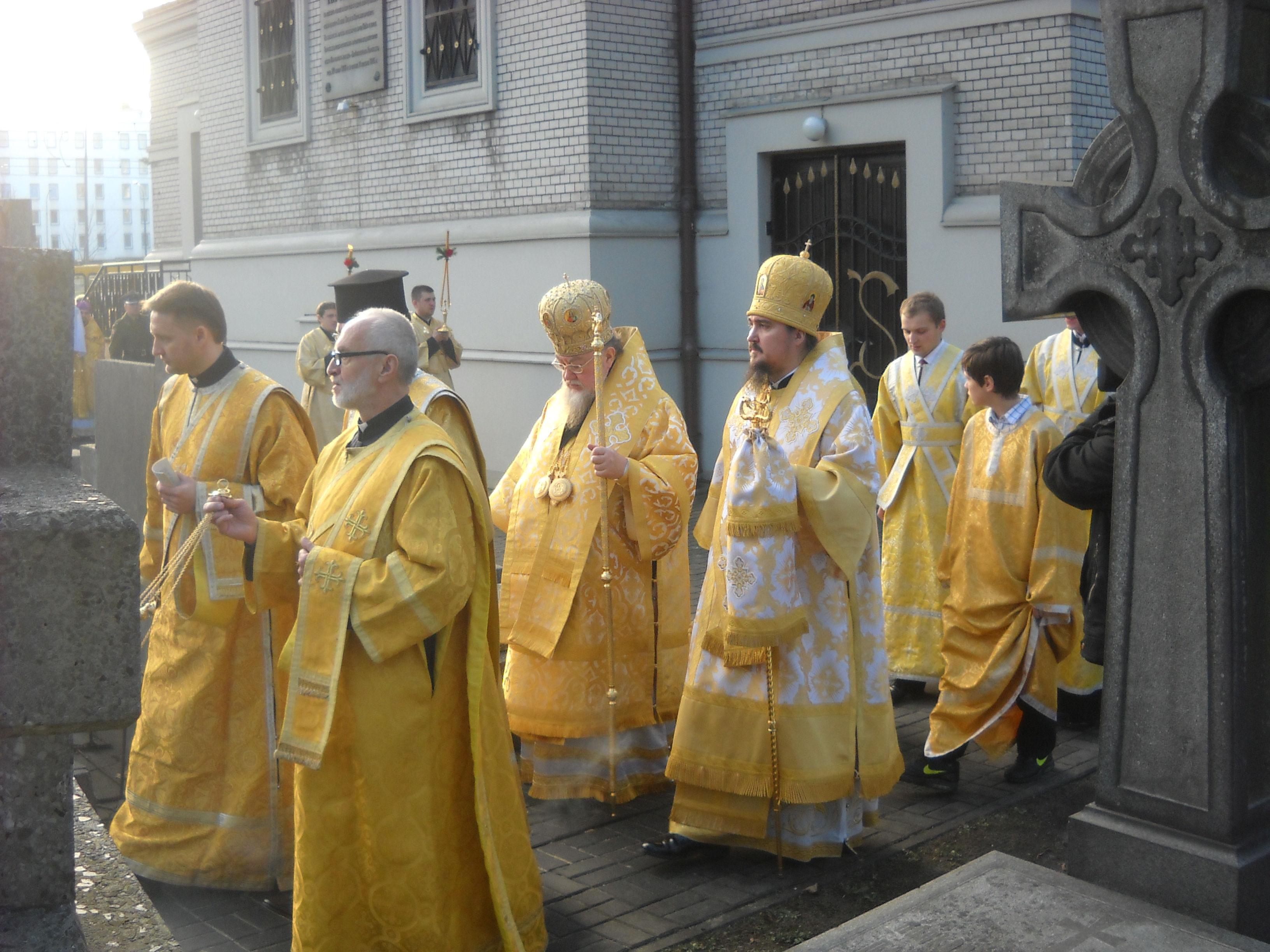 Hierarchowie i duchowieństwo w czasie powtórnego pogrzebu biskupów Sawy (Sowietowa) i Mateusza (Siemaszki) na cmentarzu prawosławnym w Warszawie.